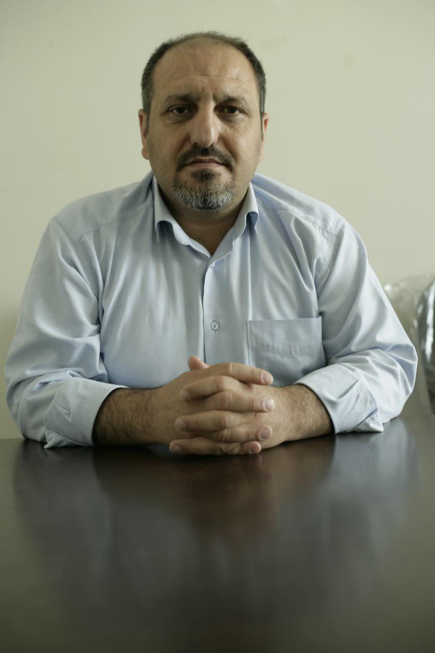 تۆرکجه: شهرام زمانی آذربایجانلی یازیچی و شورنالیست